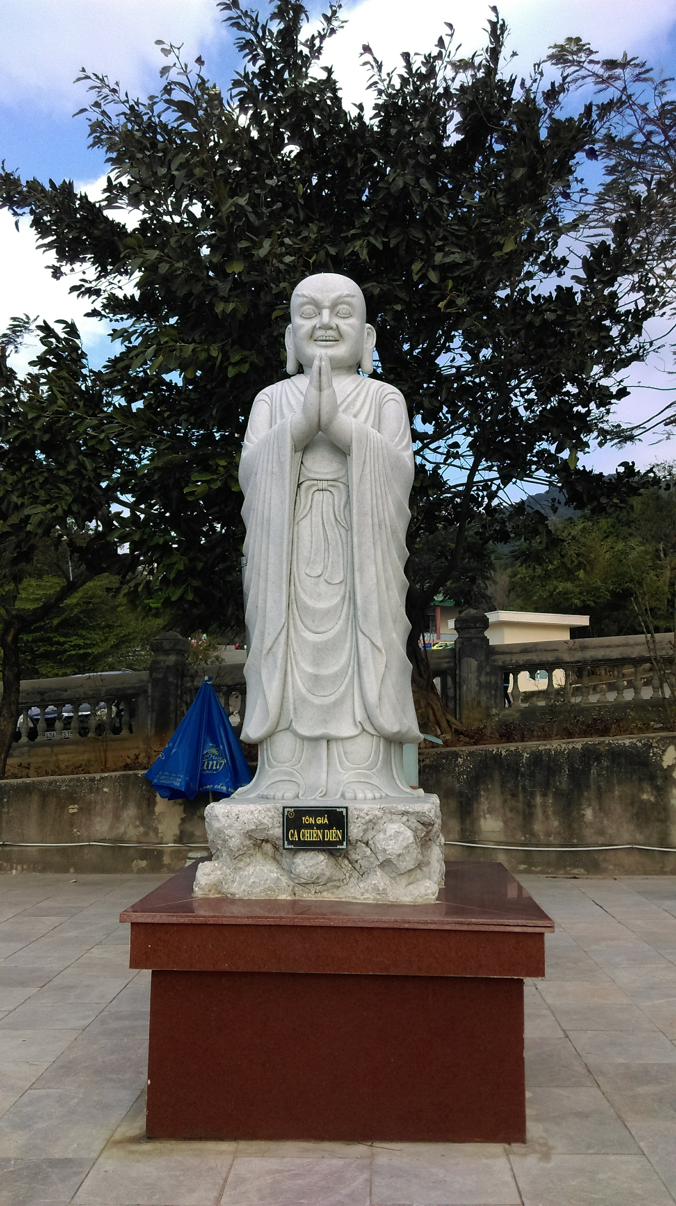 Ca Chiên Diên, chùa Linh Ứng Sơn Trà, Đà Nẵng